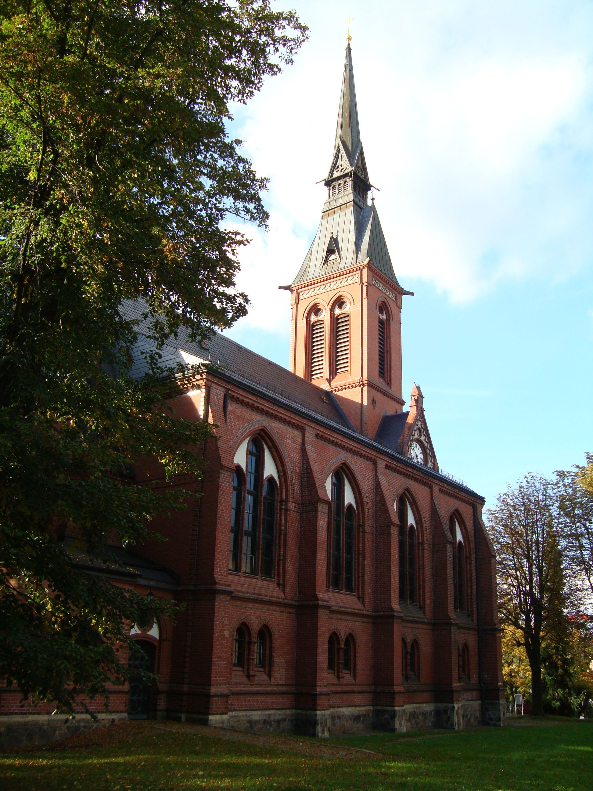 St. Andreaskirche in Chemnitz-Gablenz